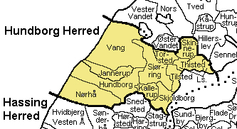 Hundborg Herred, Thisted Amt Denmark Source: Map by Svend-Erik Christiansen